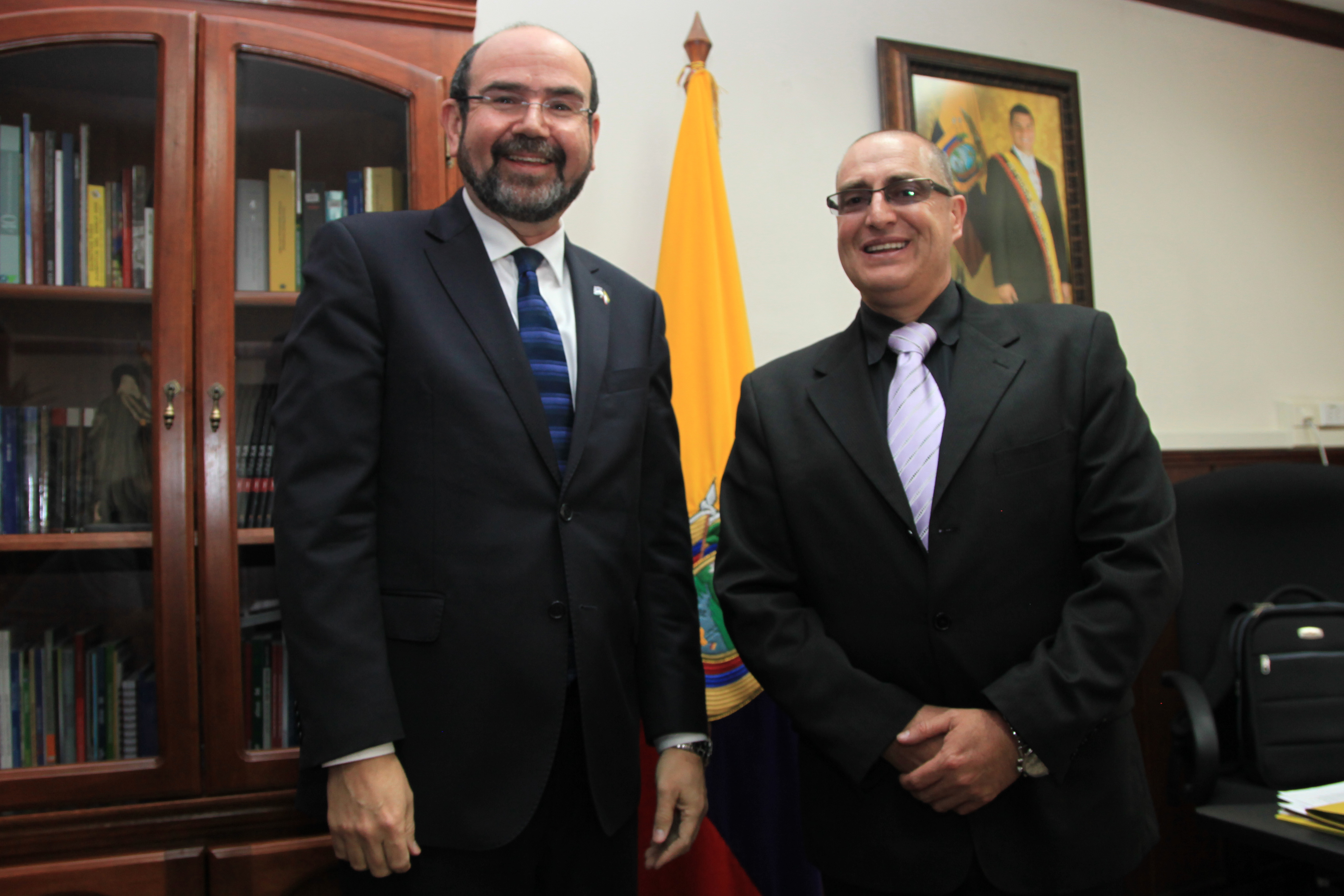 Quito (Ecuador), 28 de Agosto del 2012.-Presentación de Cartas Credenciales del Embajador de Israel al Eliyahu Yerushalmi al Viceministro de Relaciones Exteriores Marco Albuja. Foto: Xavier Granja Cedeño/Ministerio de Relaciones Exteriores, Comercio e Integración